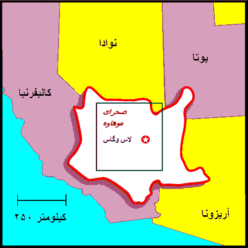 محدوده بیابان موهاوی در غرب ایالات متحده آمریکا